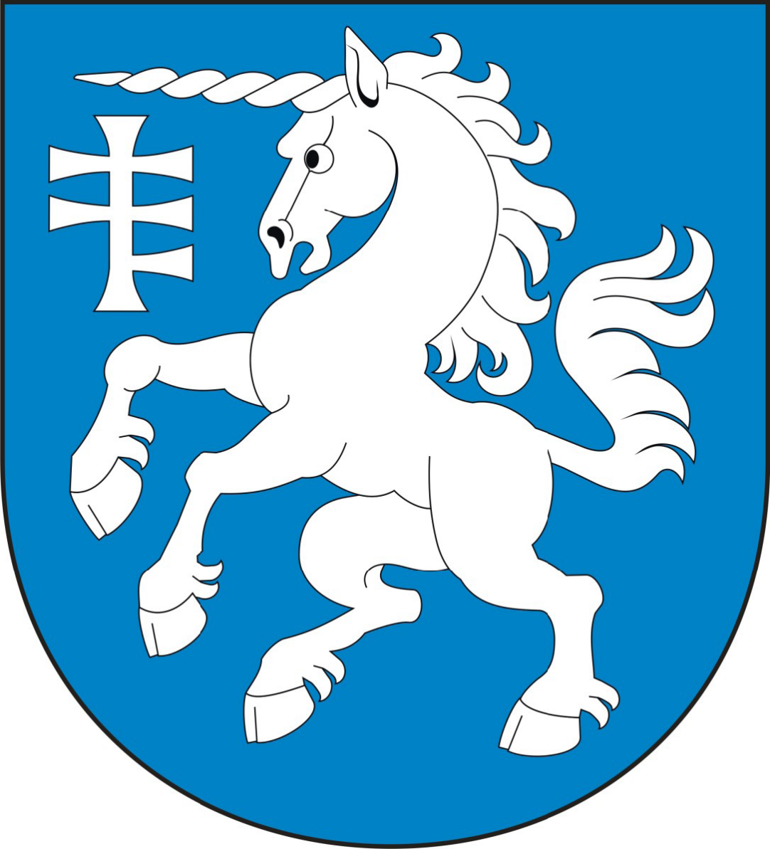 Herb gminy Serniki